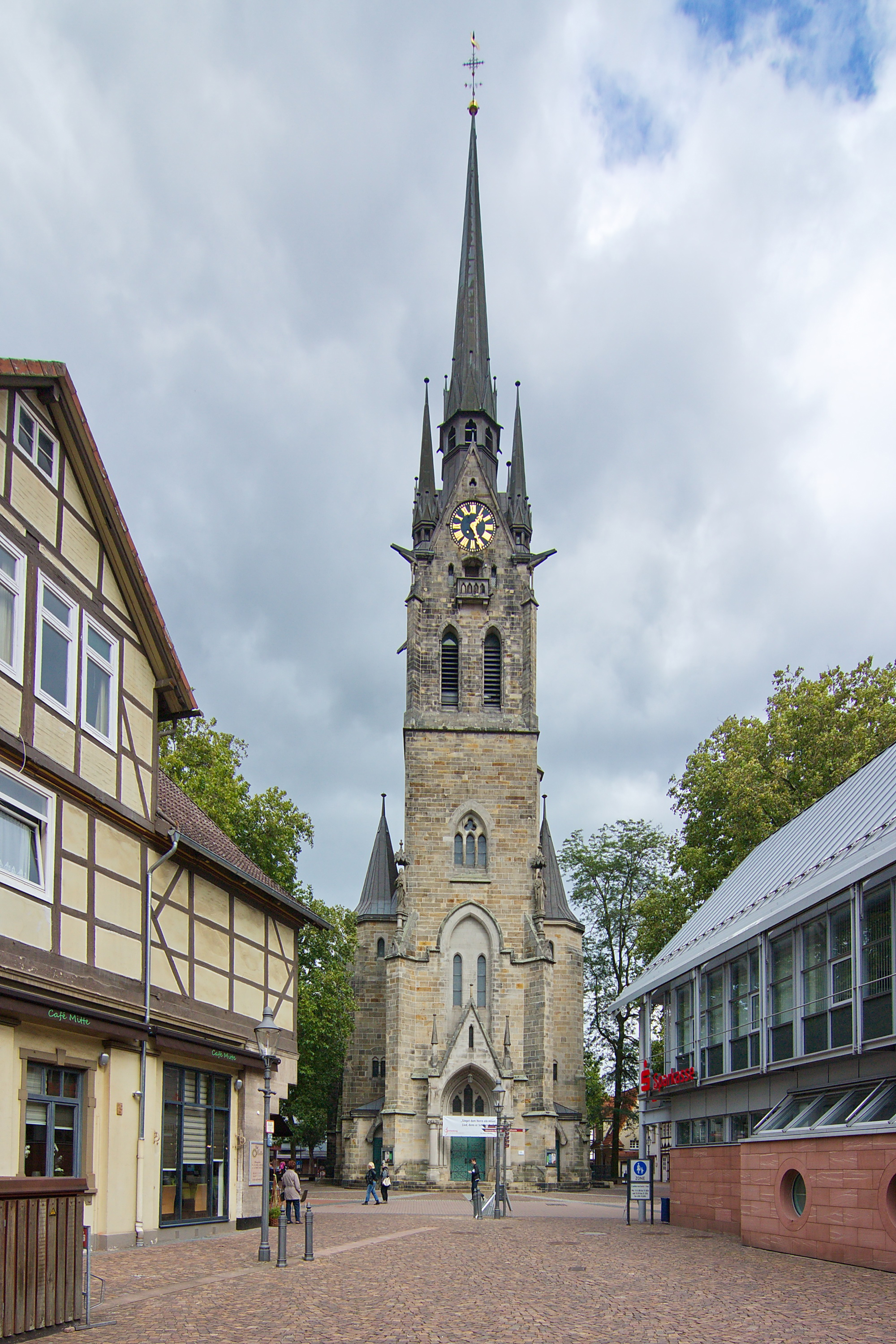 Die St.-Jakobi-Kirche ist die evangelisch-lutherische Hauptkirche von Peine in Niedersachsen. Die neugotische Saalkirche wurde 1896–1899 als Sandsteinquaderbau errichtett.